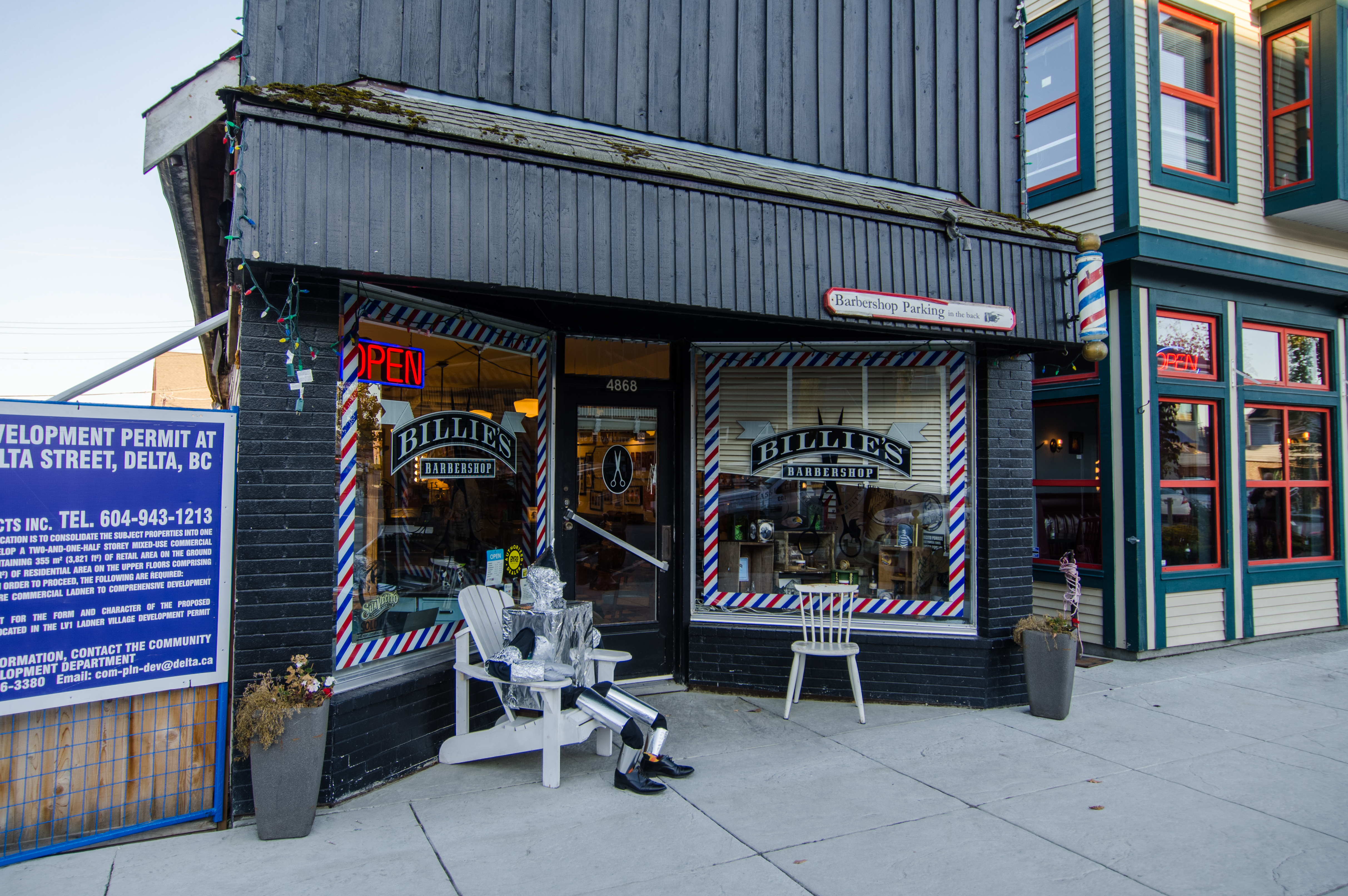 Lieu de tournage, boutique du coiffeur dans l'épisode Rien à perdre (Saison 8 de Stargate SG-1, épisode 15)